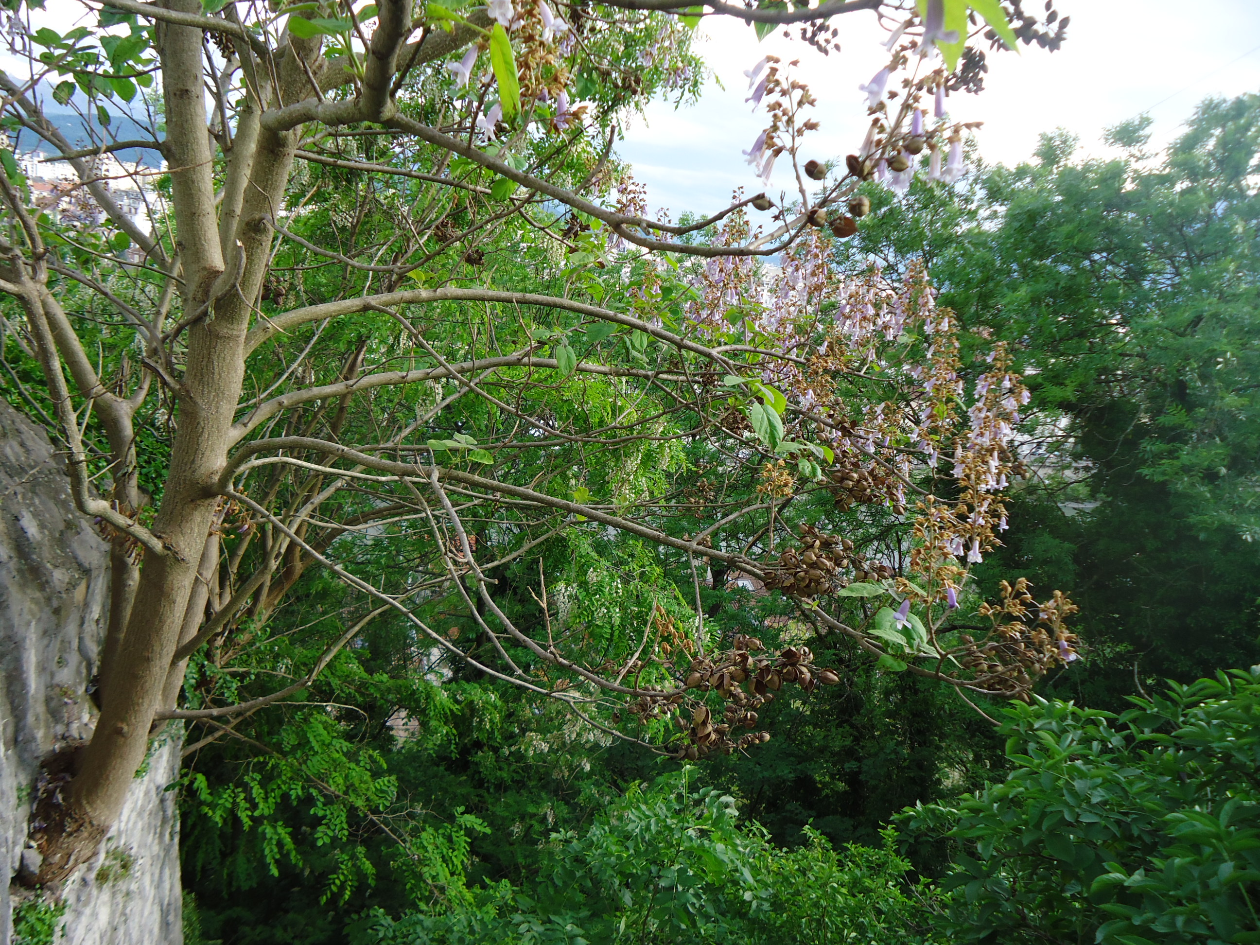 Paulownia tomentosa growing in a wall. Grenoble, France, April 2017.